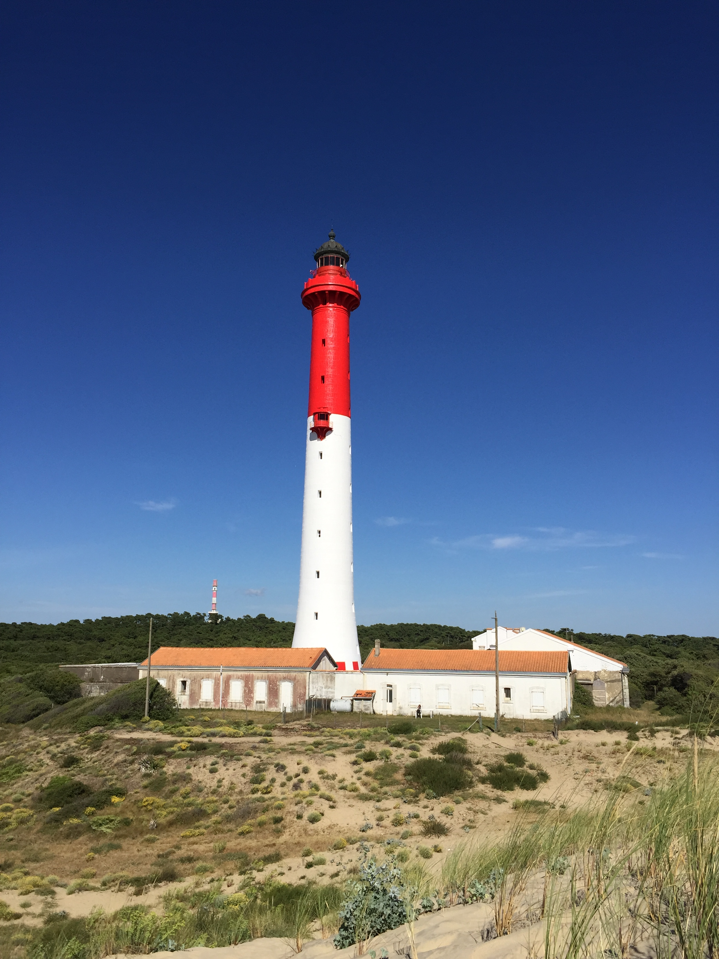 Le Phare de la Coubre a été entièrement repeint en 2016